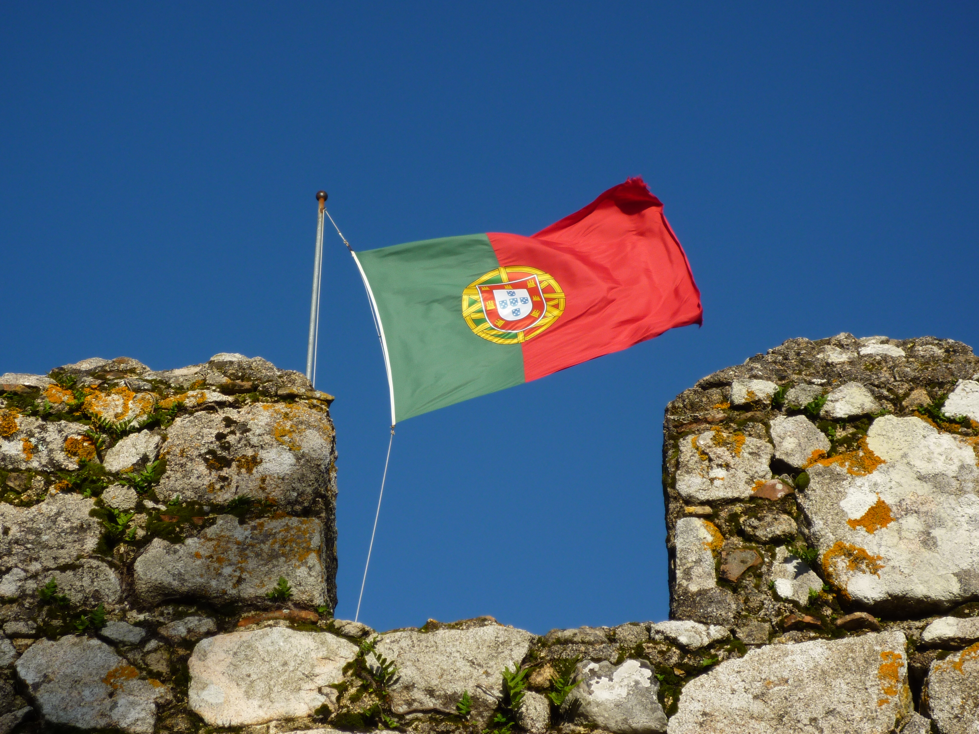 La actual bandera de Portugal se utiliza desde 1910 con la ca�da de la monarqu�a y el inicio de la Rep�blica. Sin embargo, todav�a incluye elementos que ten�a la bandera de armas que utilizaba el rey Sancho I, por all� en 1185. Curiosamente, la esfera dorada que aparece detr�s del escudo simbolizaba el reino de Brasil, en �pocas de Don Joao VI (1816). Lo que se ve al frente es una parte de las murallas del Castillo de los Moros, en Sintra. Al fondo, un hermoso cielo despejado de invierno (�!?).